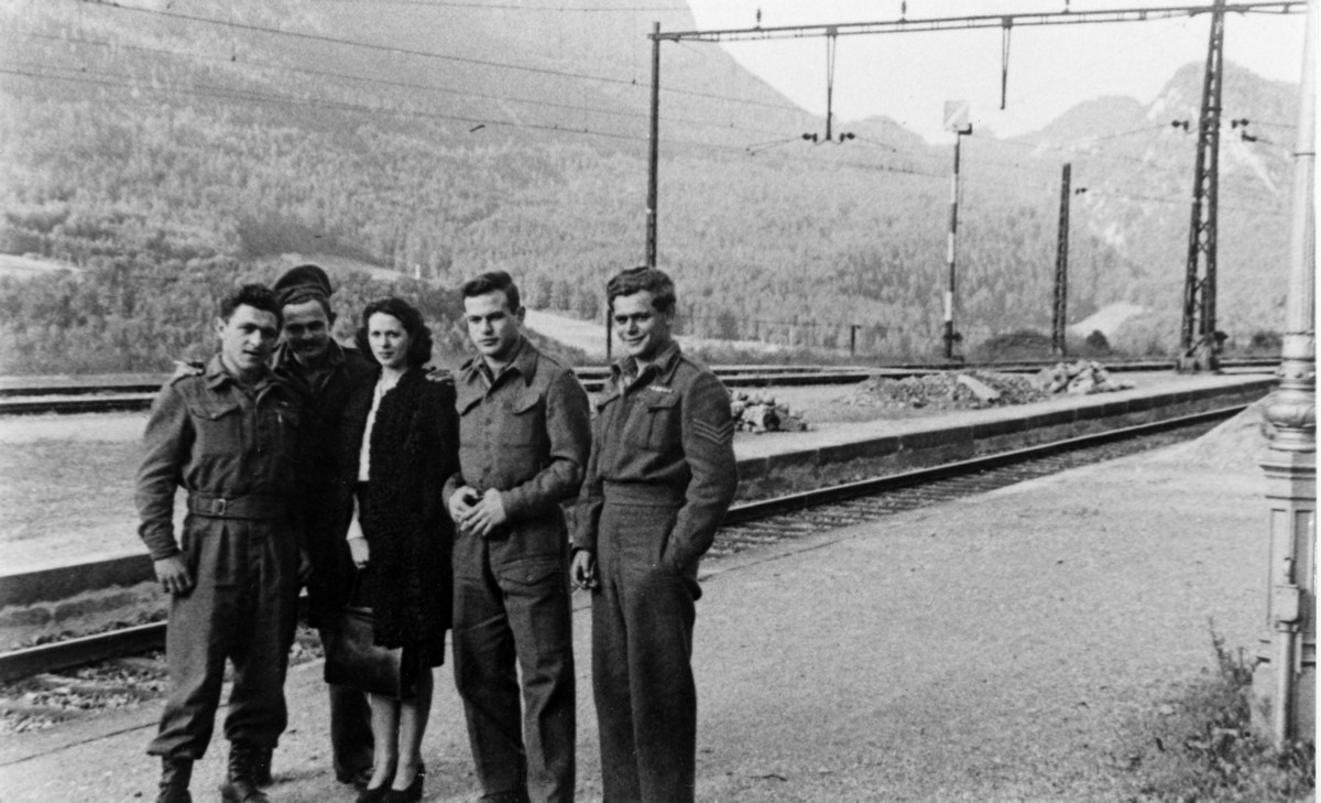 החבורה - בגבול שוויצריה צרפת. עמוס פינק, זוריק דיין, יוסקה קורן, יענקלה ארנון